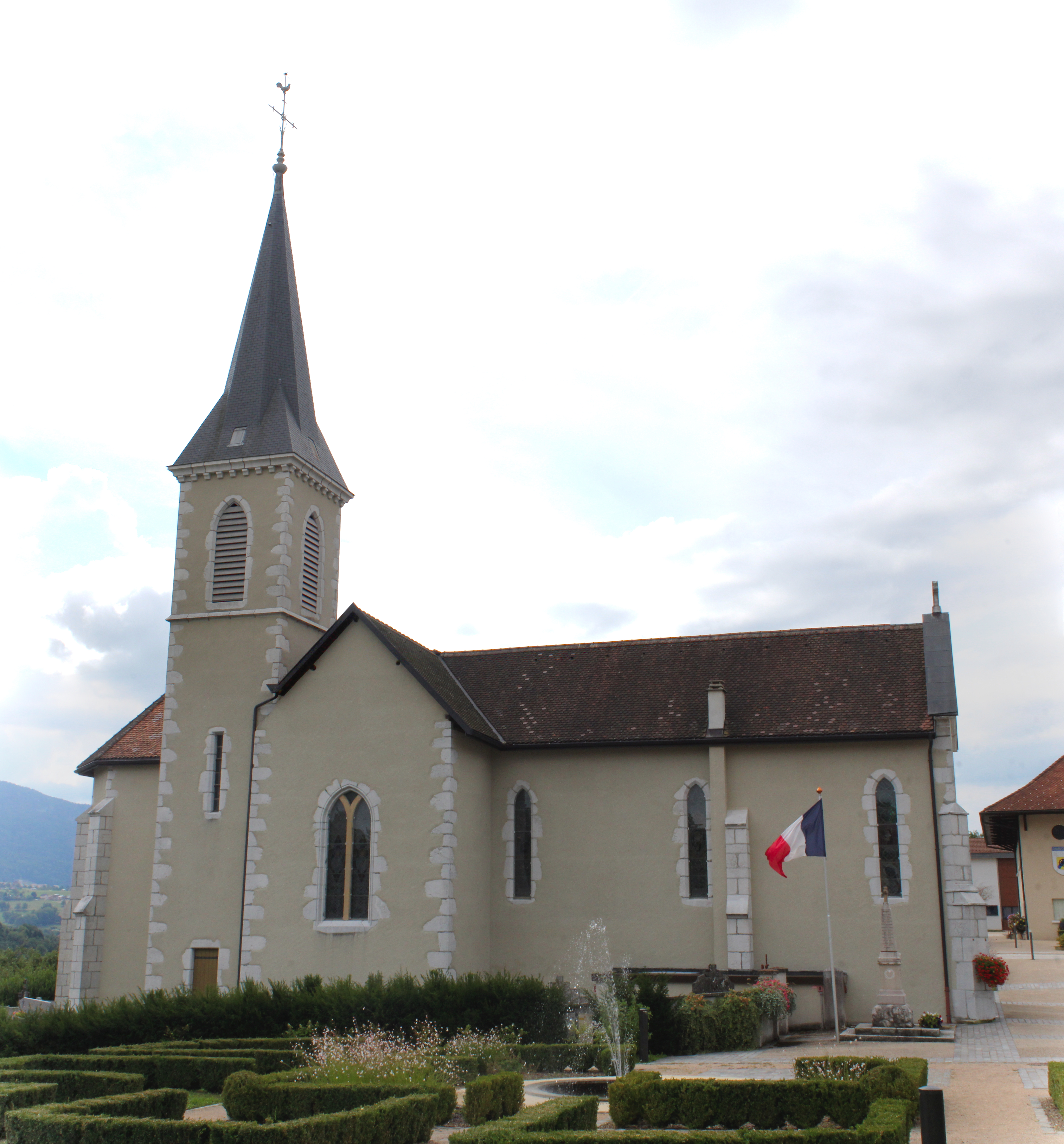 Église Saint-Jean-Baptiste de Charvonnex.